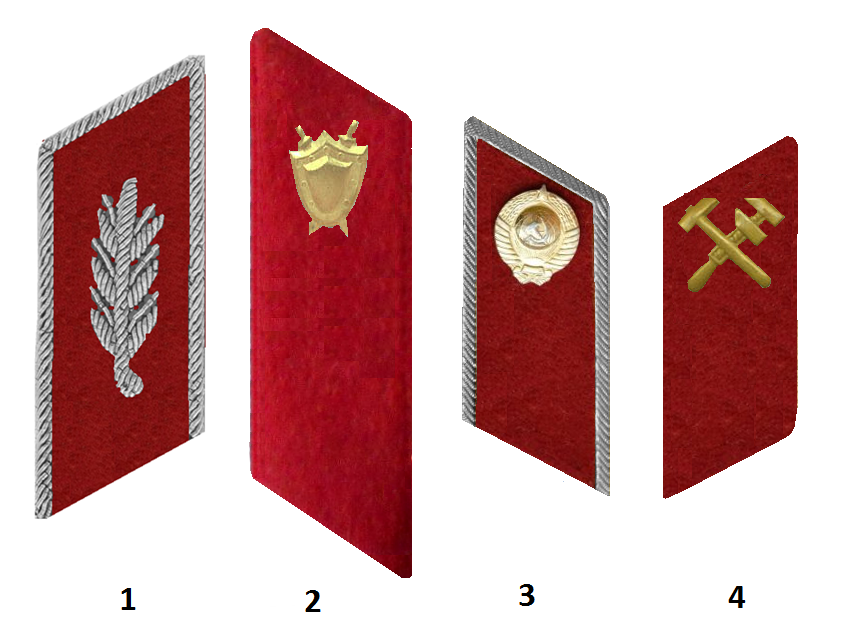 Петлицы1965